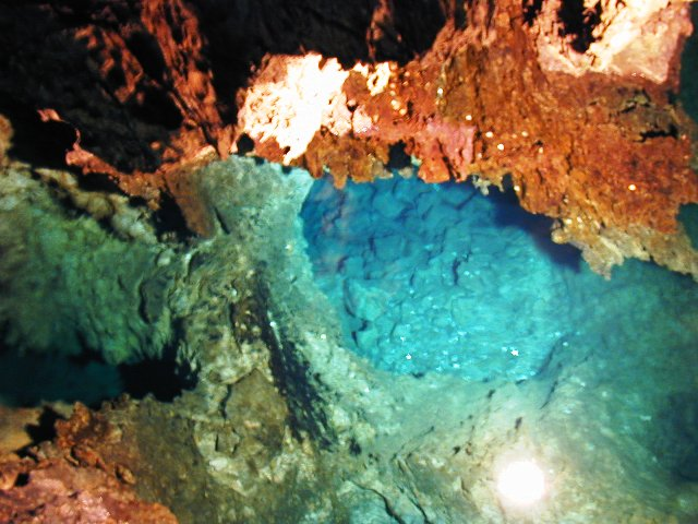 Ryūsendō underground lake, Iwaizumi, Iwate, Japan